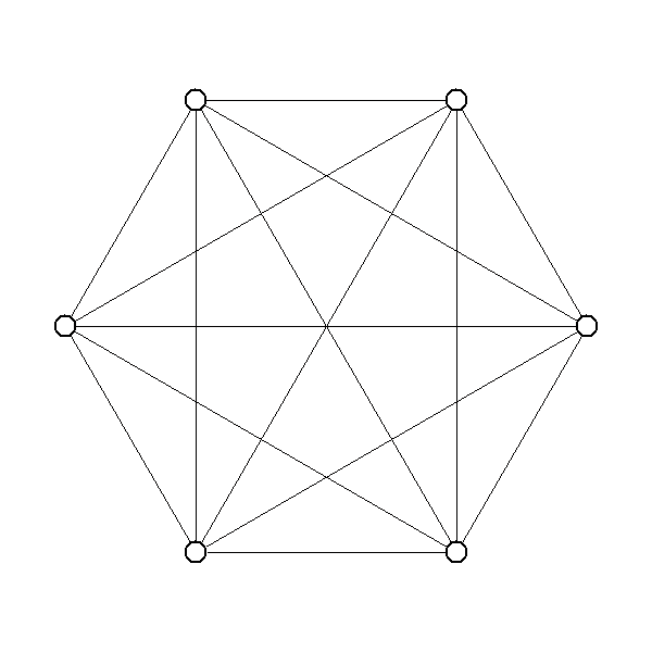 K6 complete graph